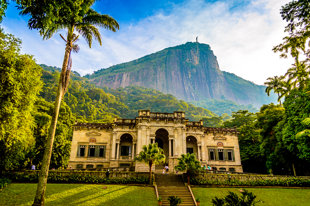 Parque Lage com Corcovado ao fundo